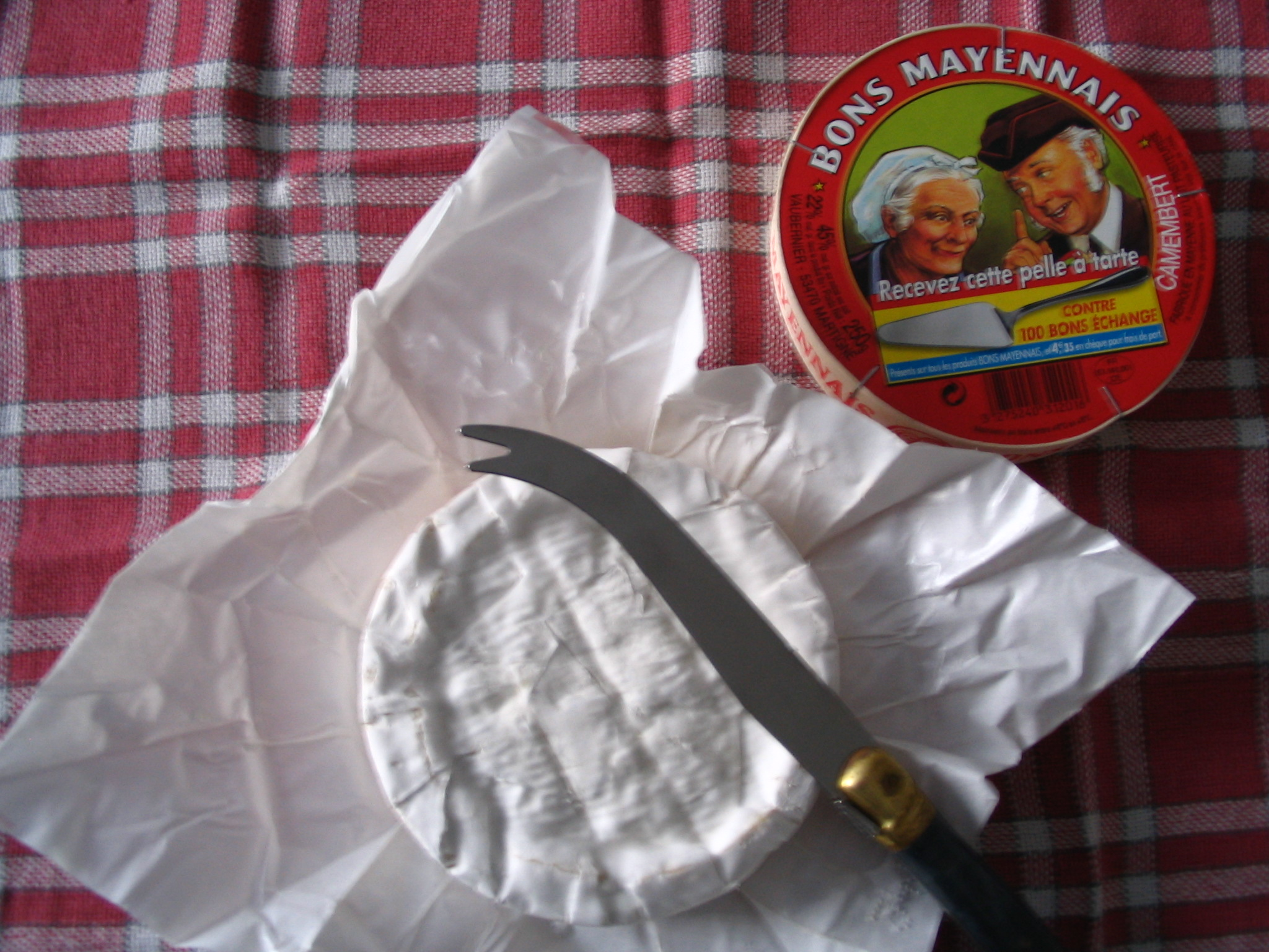 embalage et fromage Bons Mayennais et couteau a fromage